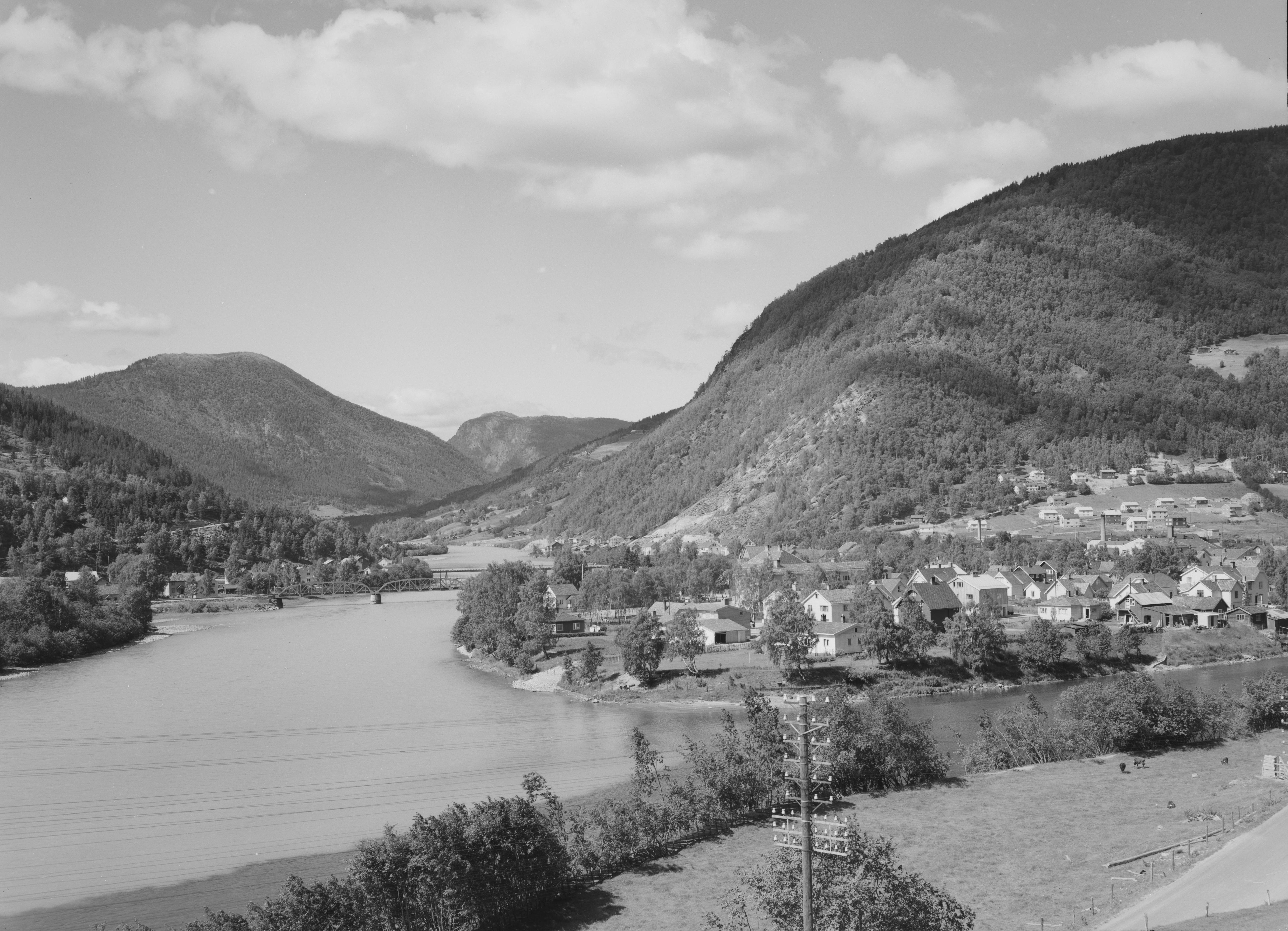 Bildet er hentet fra Nasjonalbibliotekets bildesamling Gudbrandsdalen,Otta, Sel, Oppland